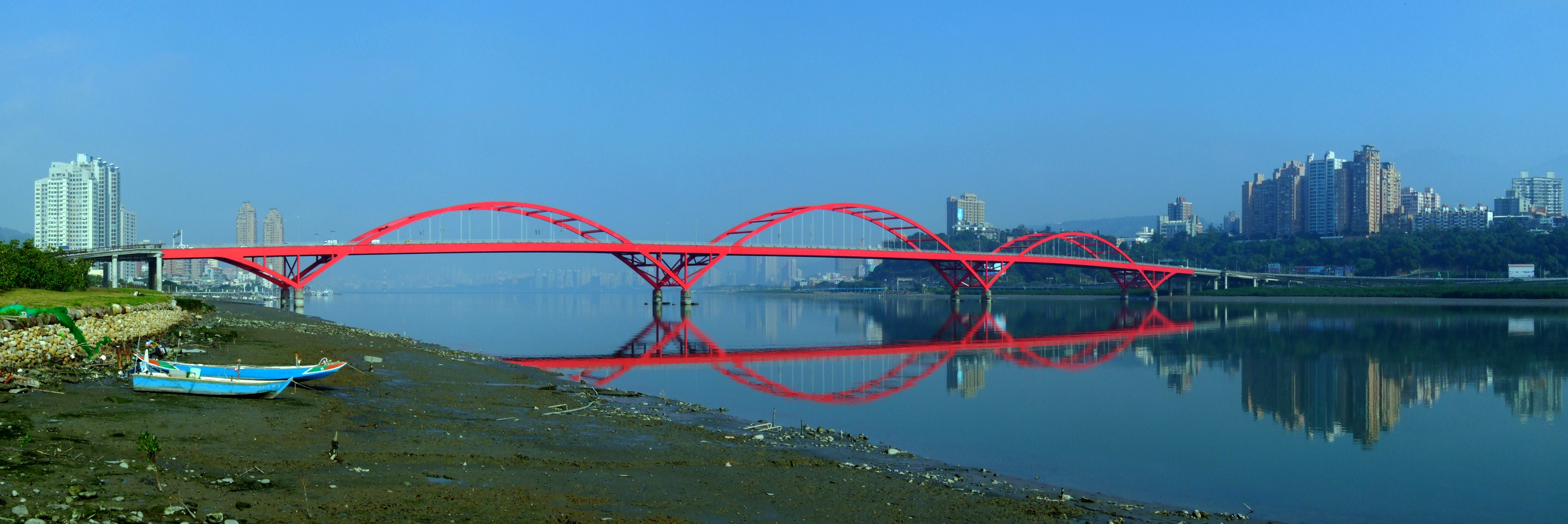 臺北縣關渡大橋廣角照片。